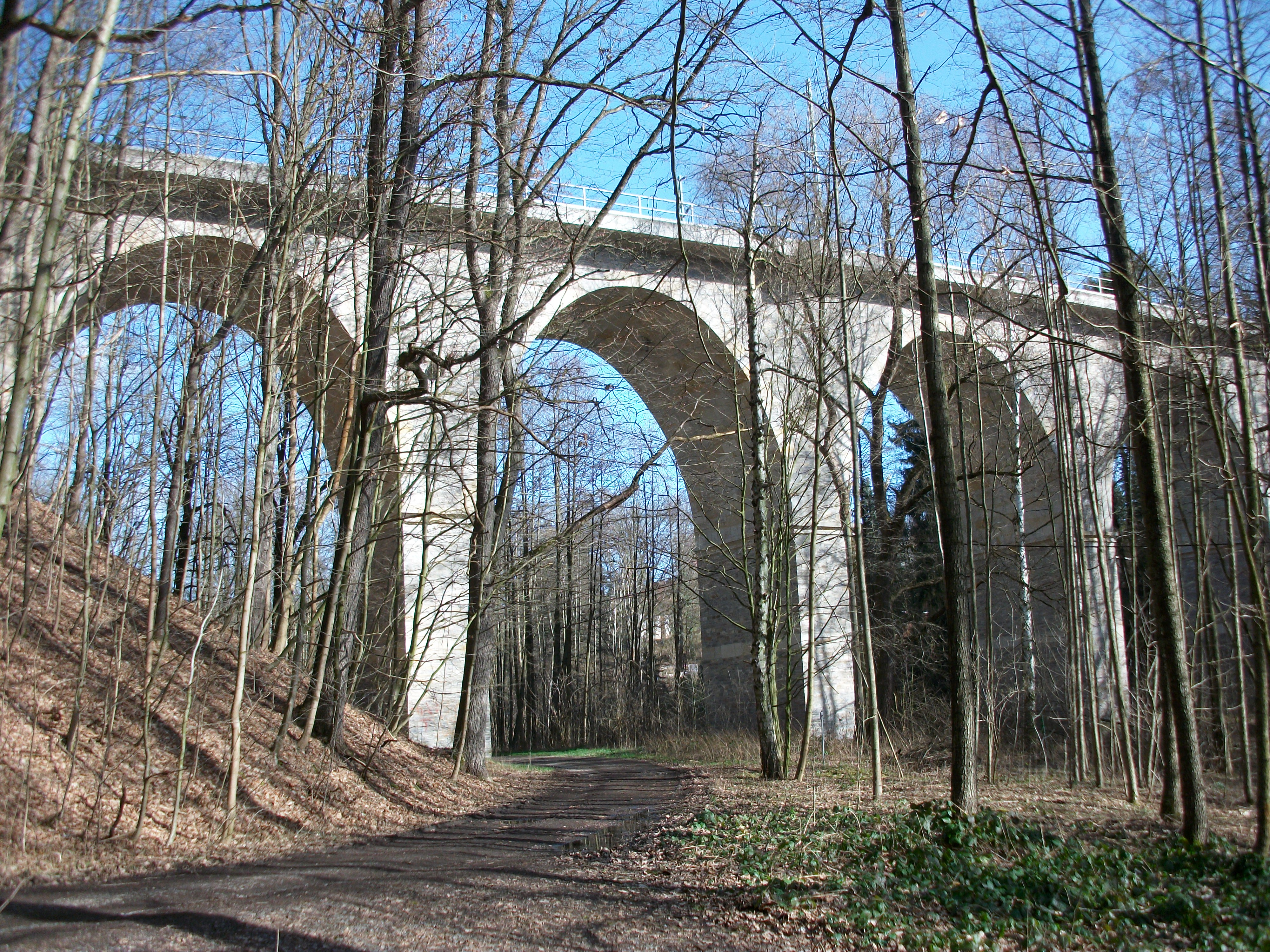 Hüttengrundviadukt (2020)